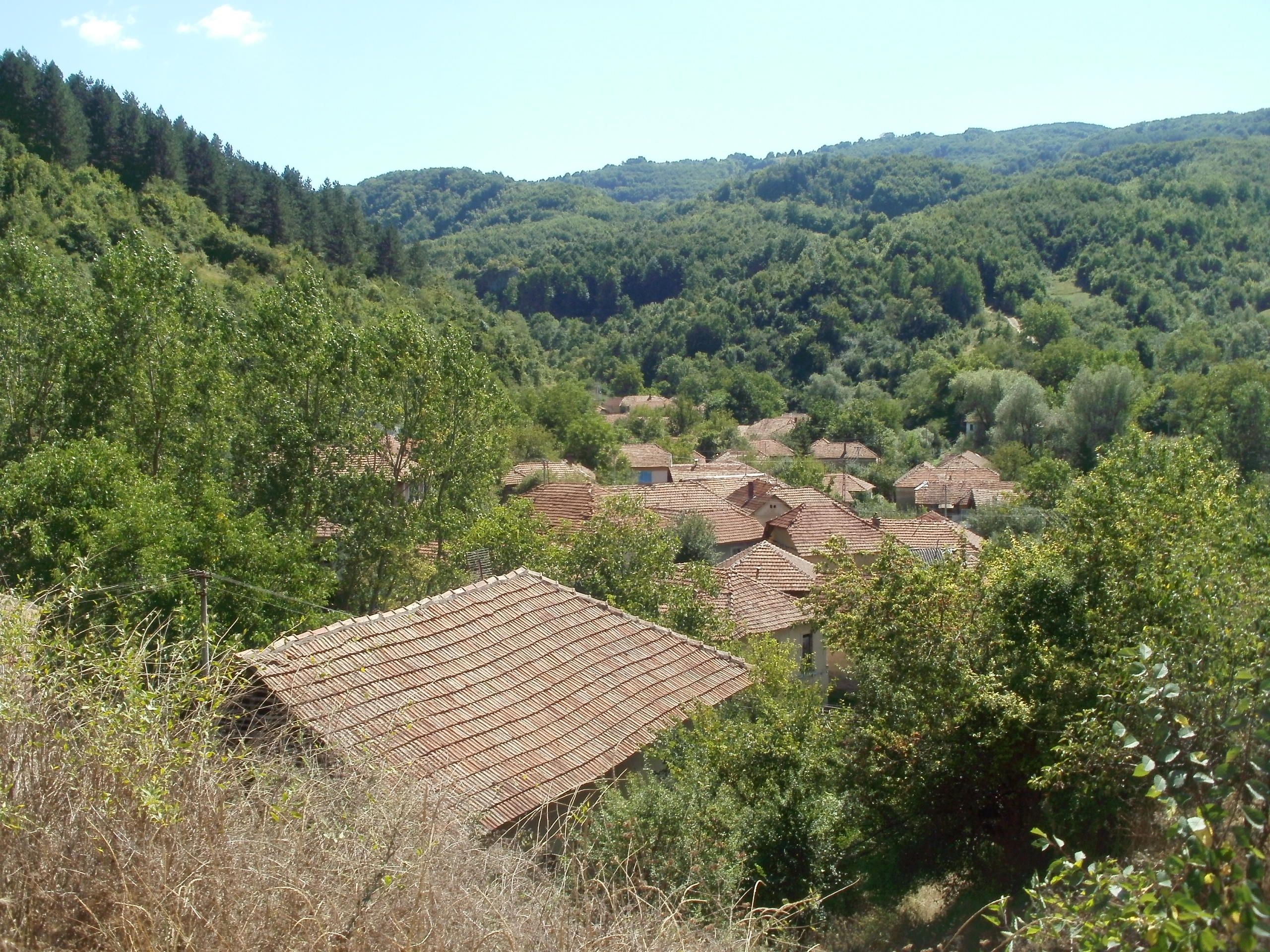 Село Добри До у пиротском округу. Аутор слике Пирке Блогер са сајта